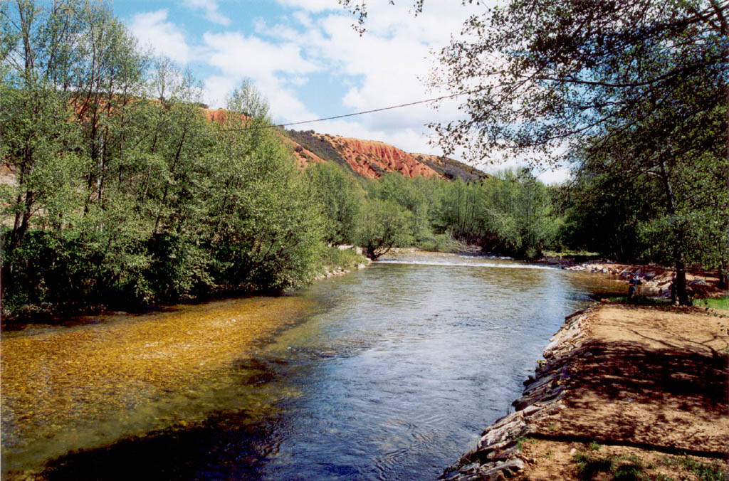 Río Duerna desde el puente de Priaranza